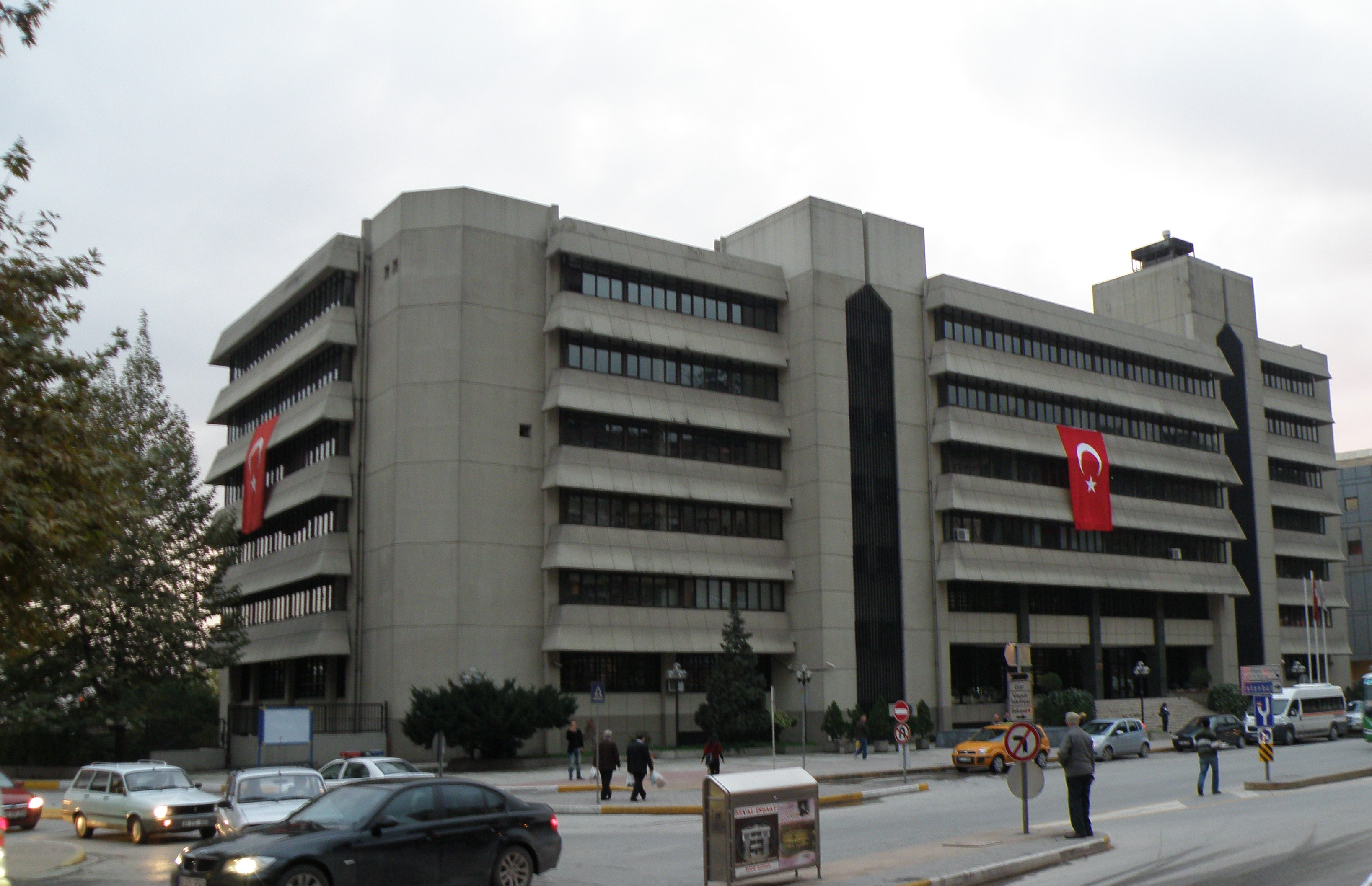 Kocaeli T.C. Central Bank k'yg*